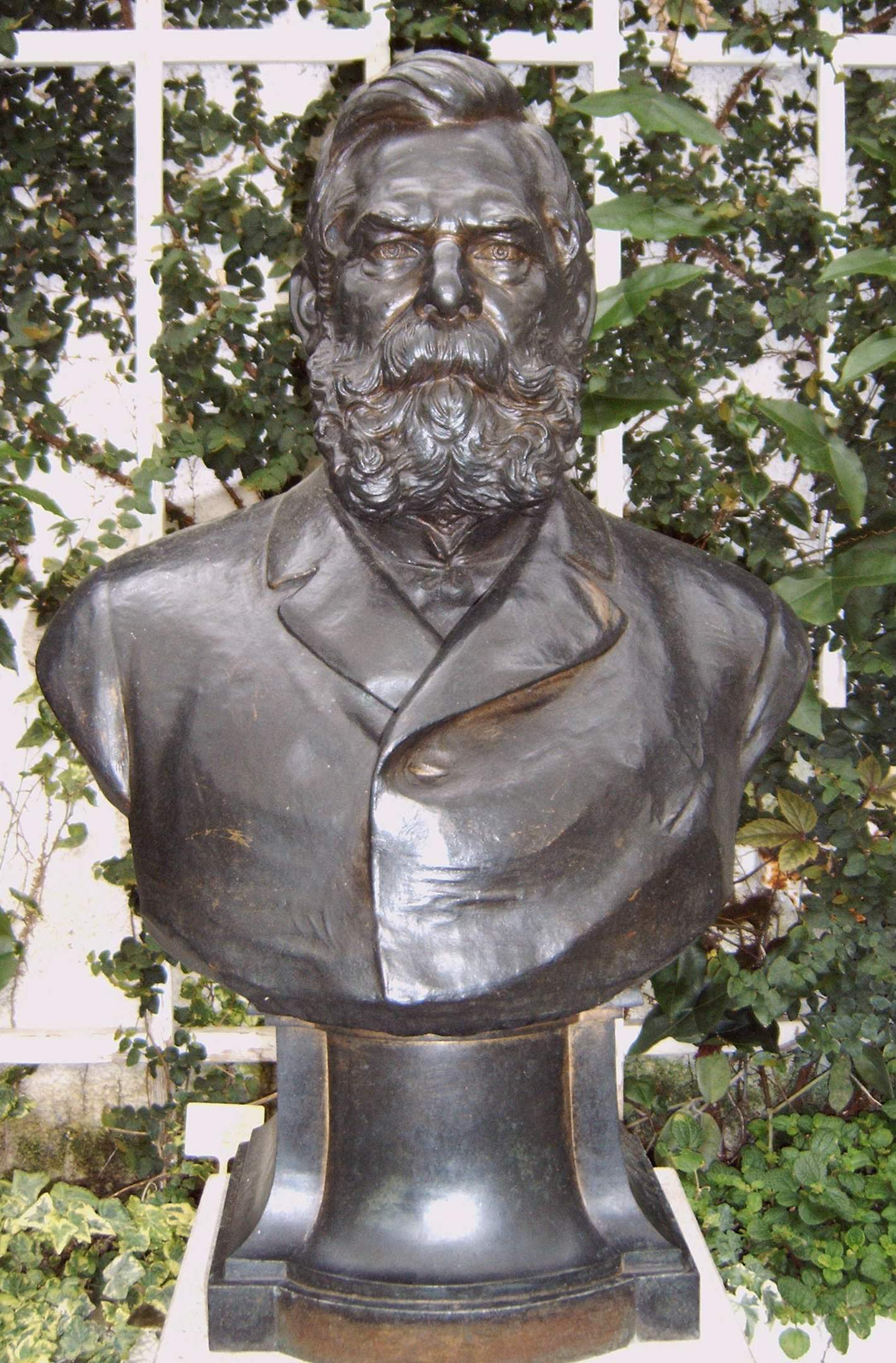 Büste Hermann Grusons in den Gruson-Gewächshäuser in Magdeburg Bild aufgenommen am 27.5.2006